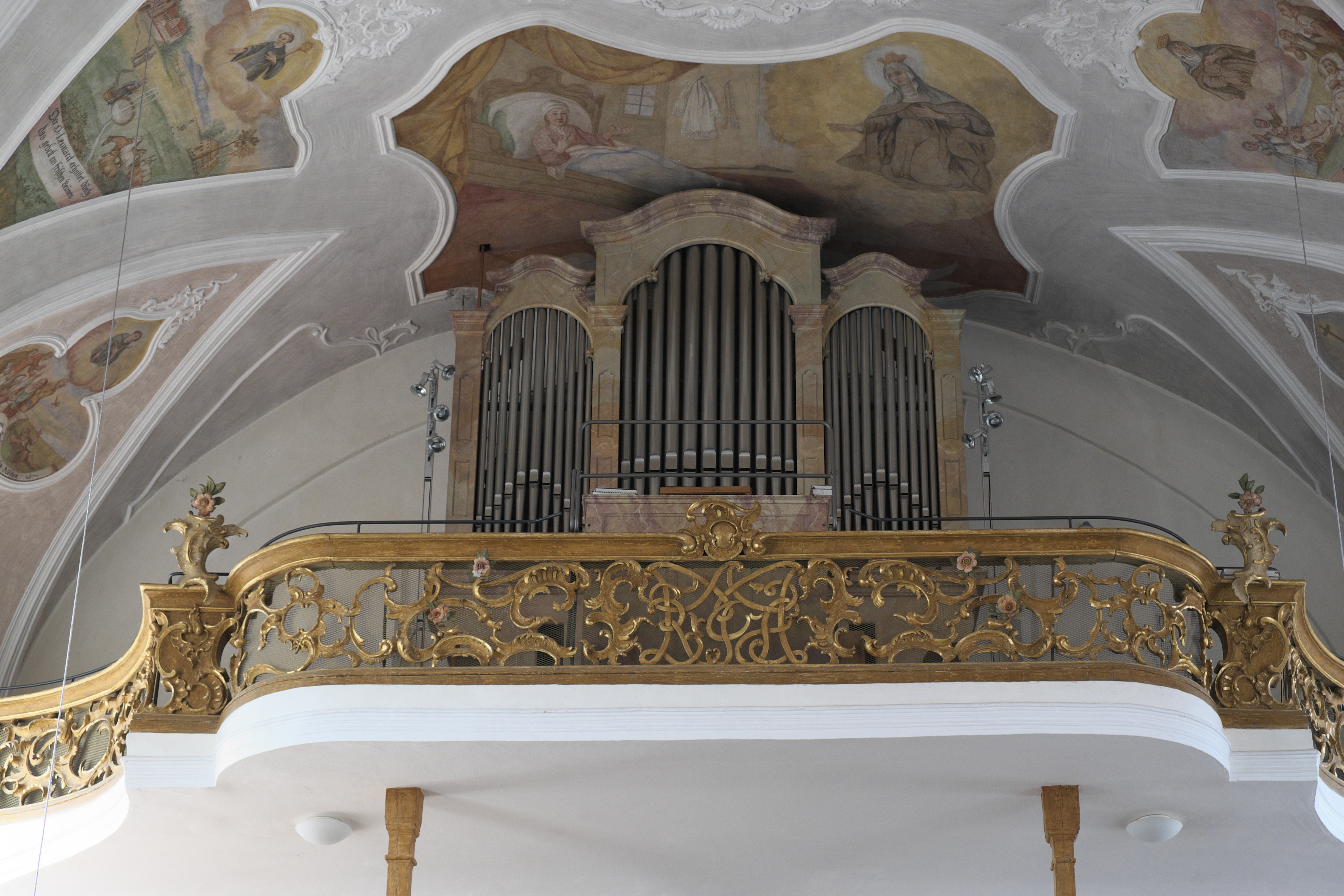 Katholische Pfarrkirche St. Michael in Reichenkirchen (Fraunberg) im Landkreis Erding (Bayern/Deutschland), Doppelempore und Orgel